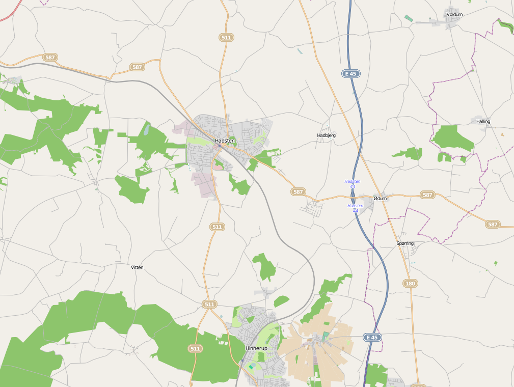 da: Kort over Hadsten og omkringliggende arealer